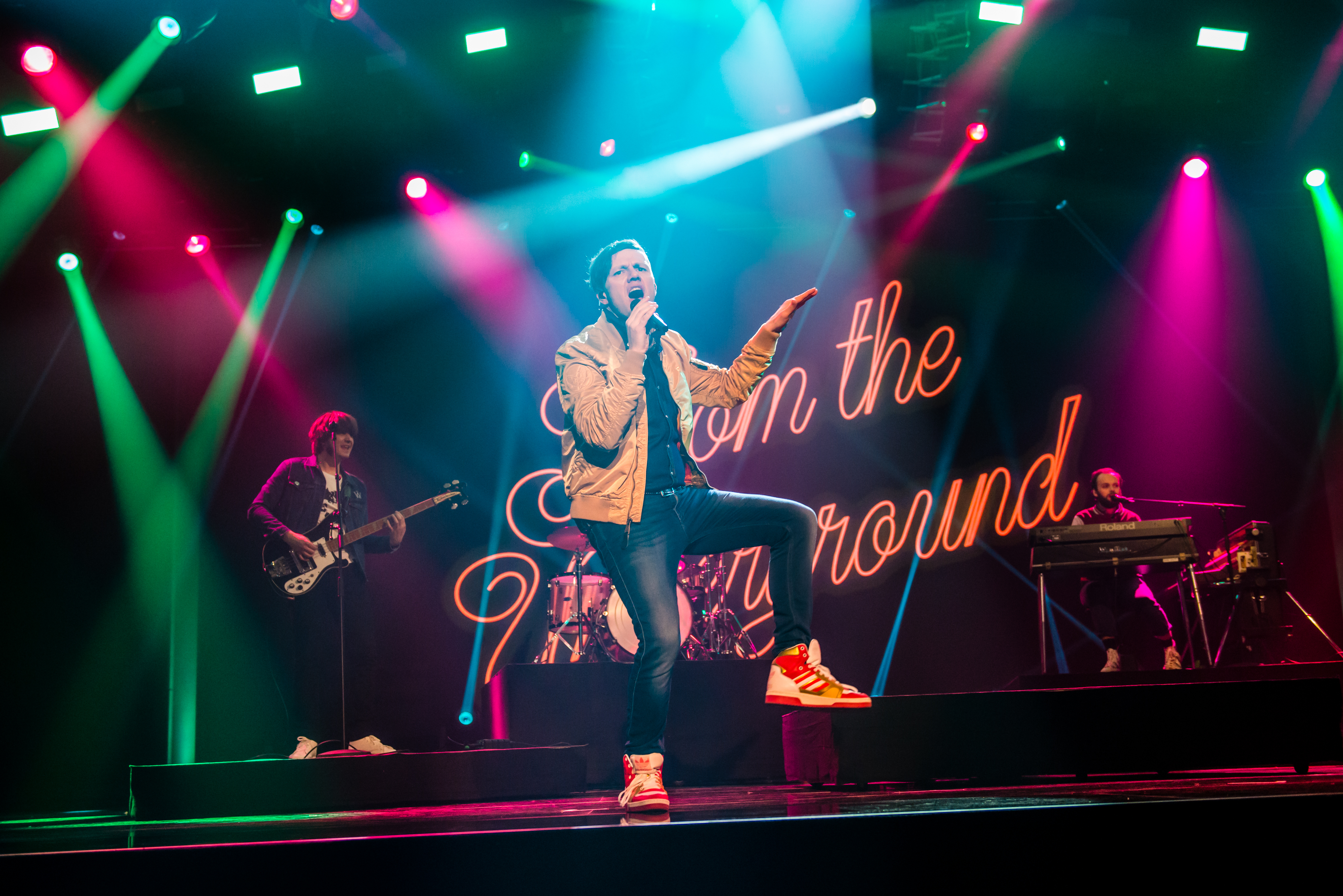 Eurovision Song Contest 2016 - Unser Lied für Stockholm - Woods of Birnam